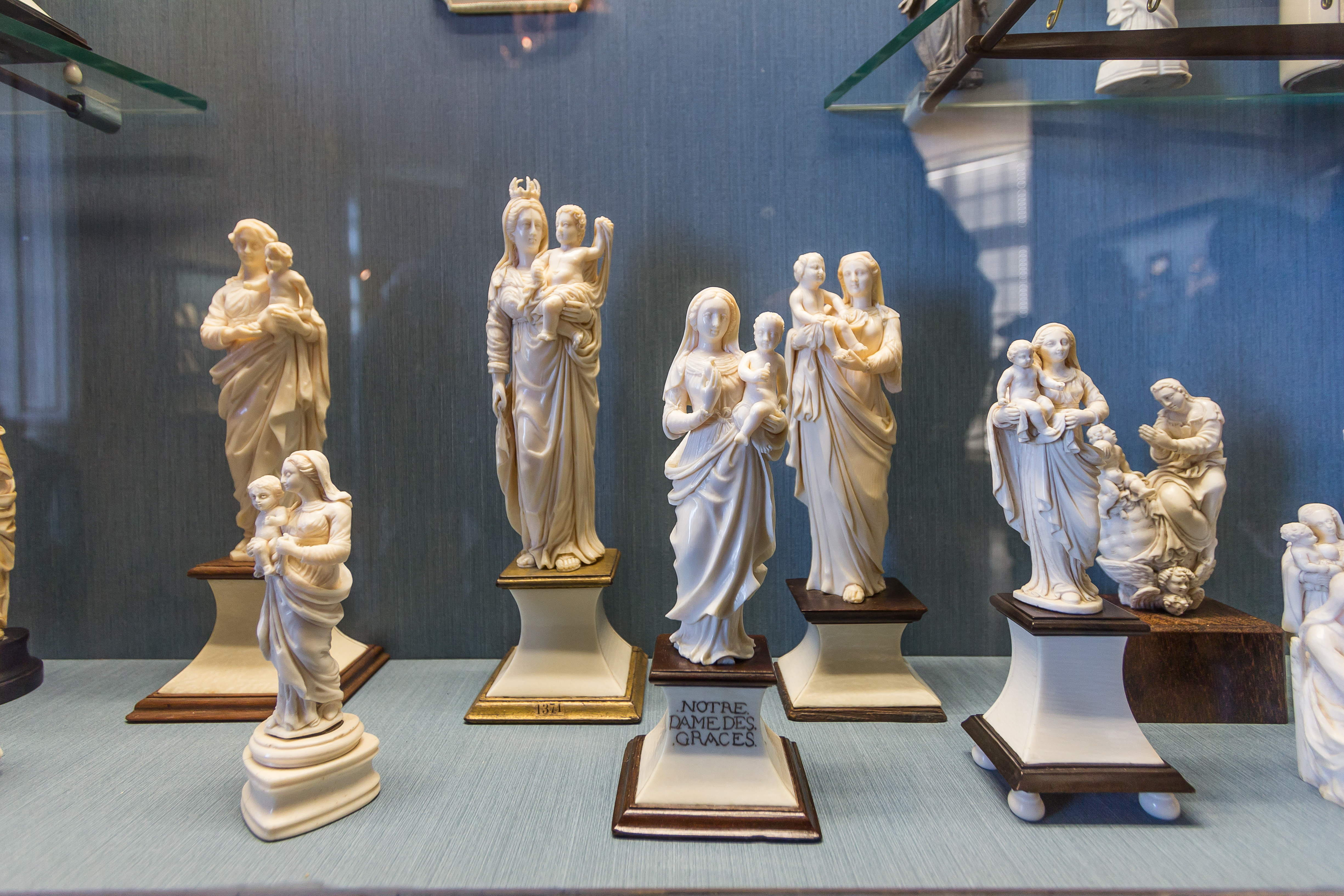 Château-Musée de Dieppe, Ivoires